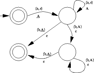 Staka finstatrekognanta aŭtomato ekzemplo